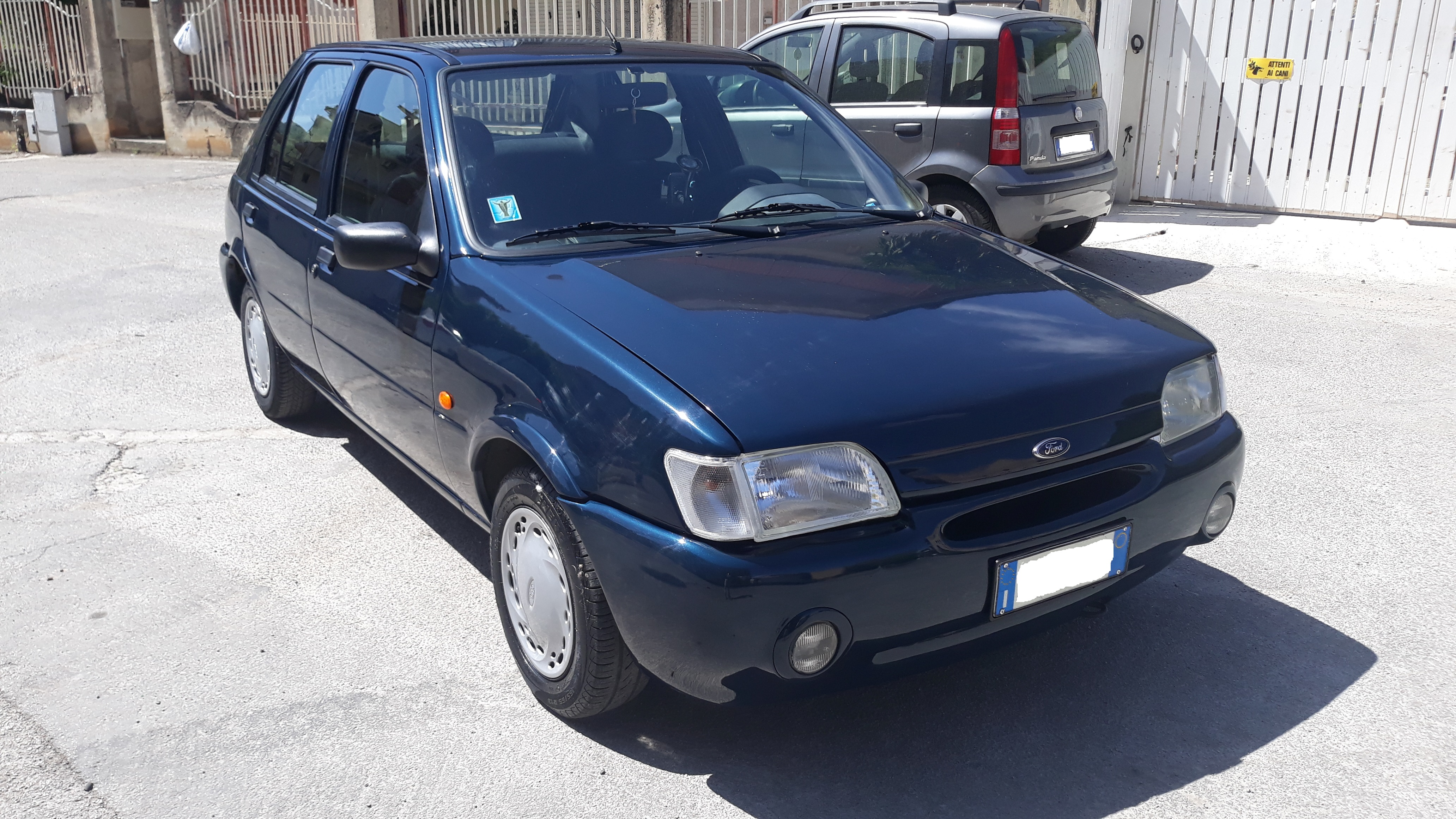 Ford Fiesta Pro (vista anteriore)